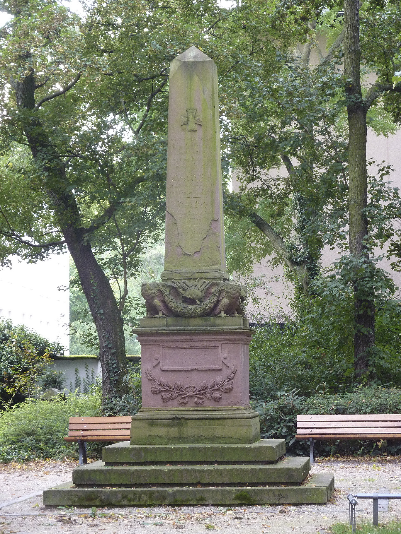 Frankfurt am Main, Stadtteil Bockenheim: Der Alte Friedhof Bockenheim ist ein von 1825 bis 1898 für Begräbnisse genutzter Friedhof, der im Jahr 1916 zu einer öffentlichen Grünanlage umgewidmet wurde. Das Foto zeigt das Kriegerdenkmal aus dem Jahr 1875 im Park